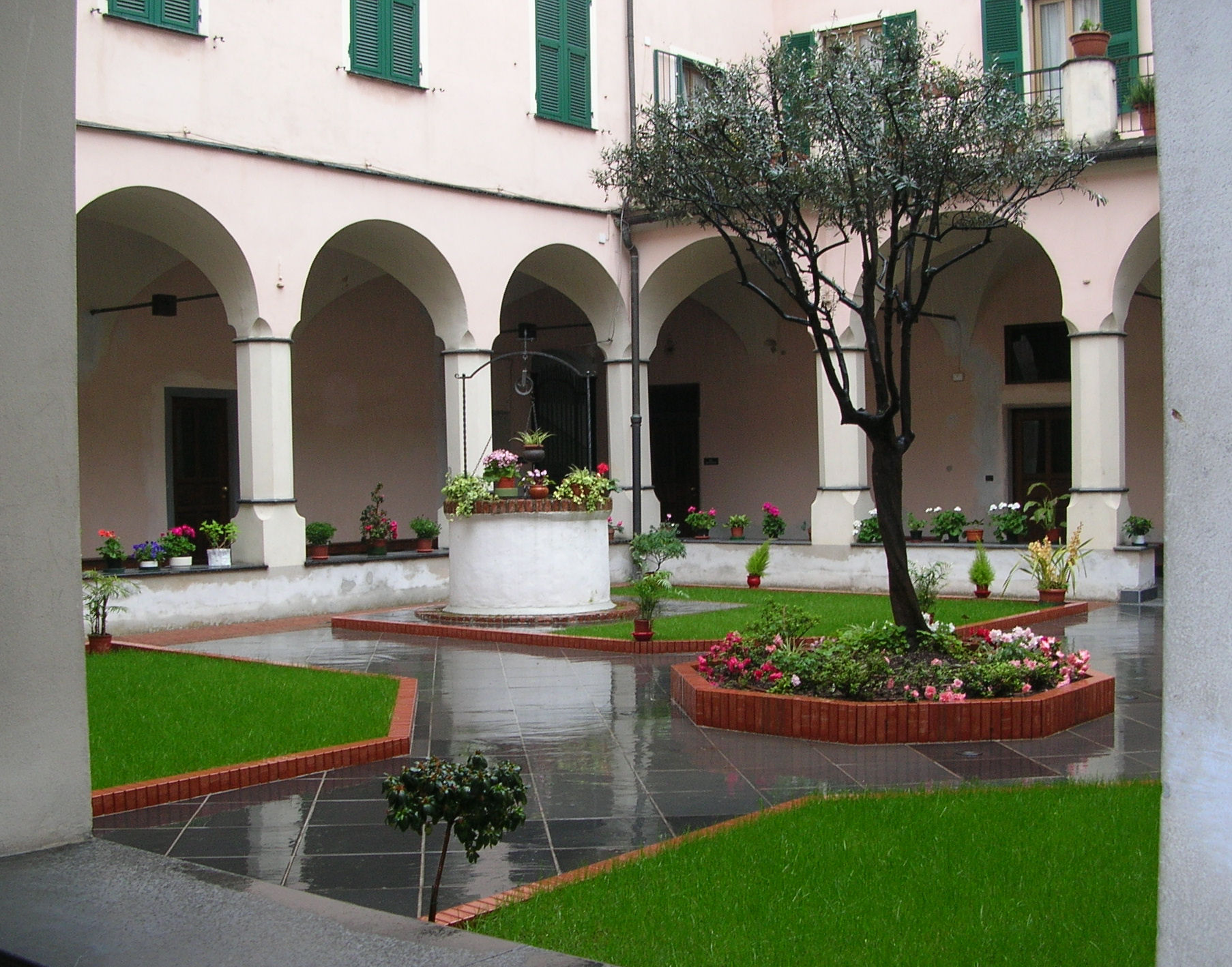 Il chiostro del convento di San Francesco alla Chiappetta (Genova-Bolzaneto) Foto propria Aprile 2009